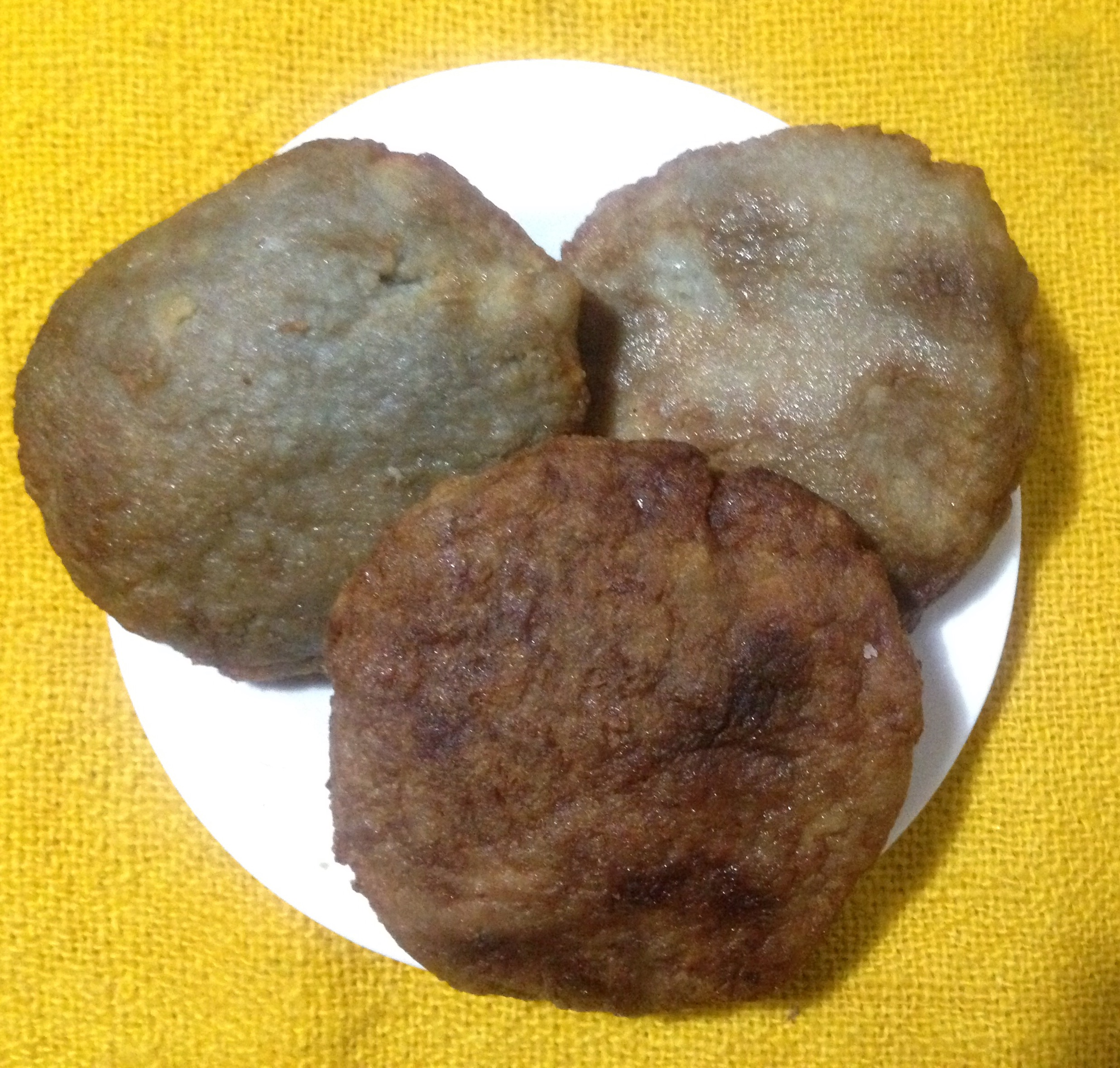 Milcaos fritos, gastronomía de Chiloé